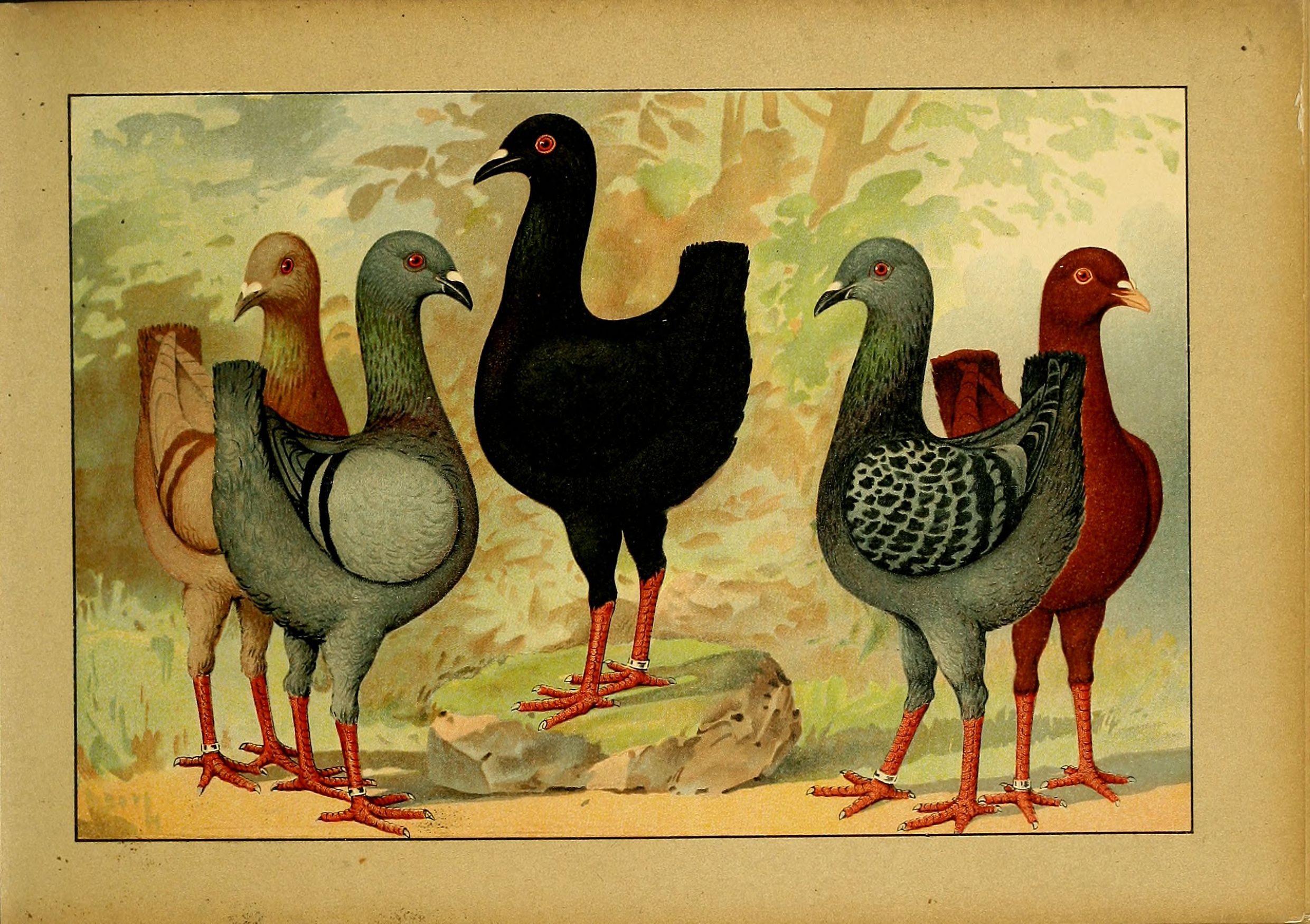 Deutsch